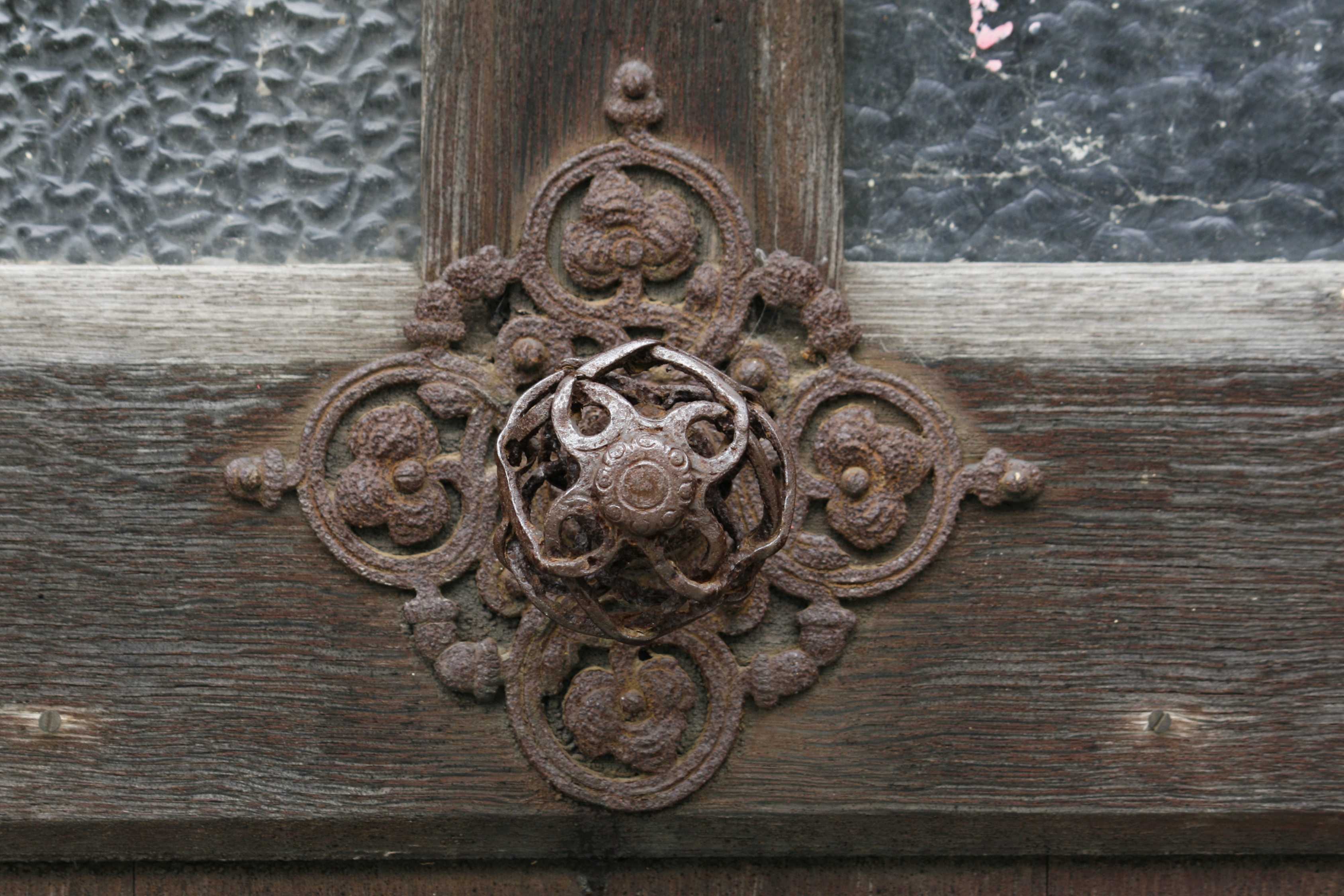 August-Bebel-Straße, Herrnhut